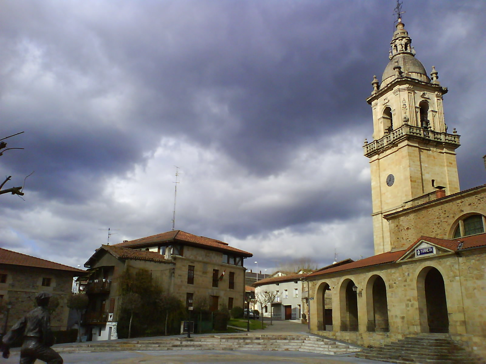 Vista general de la Plaza San Miguel de Iurreta, Vizcaya(País vasco) (España).